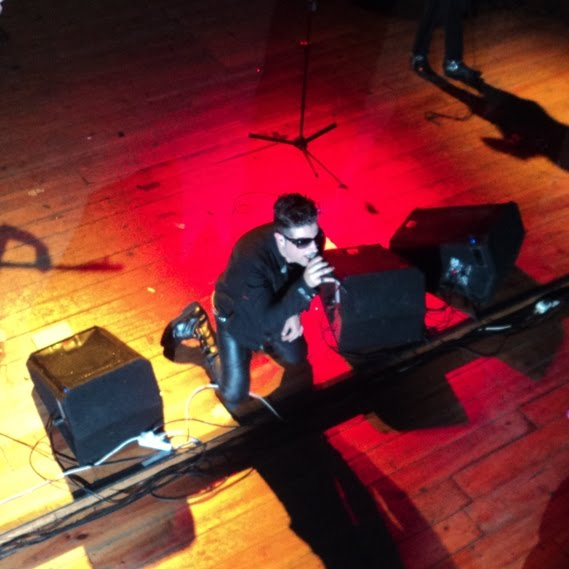 le chanteur du groupe Noctivagus